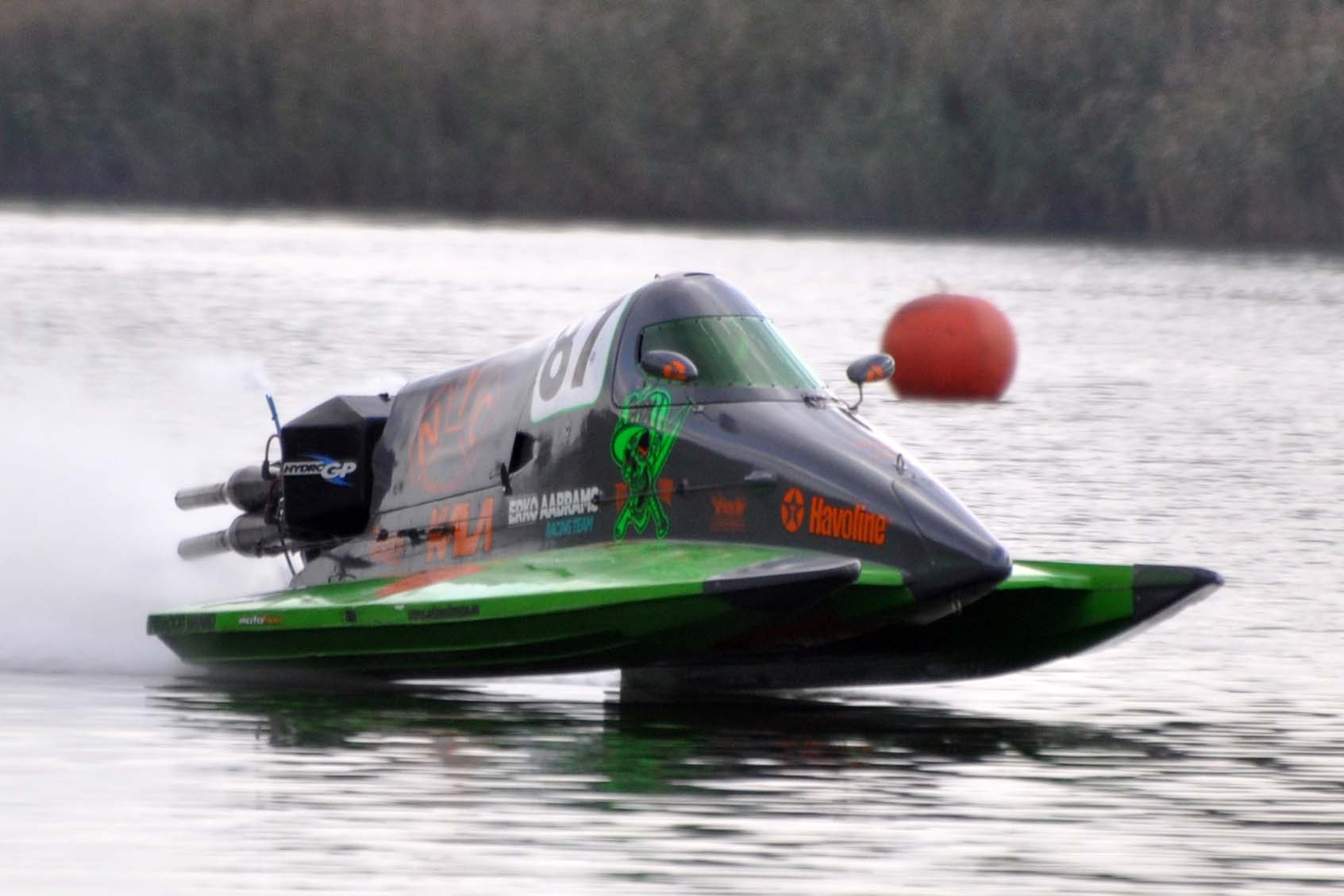 Erko Aabrams maailmameister (pildil F-500)